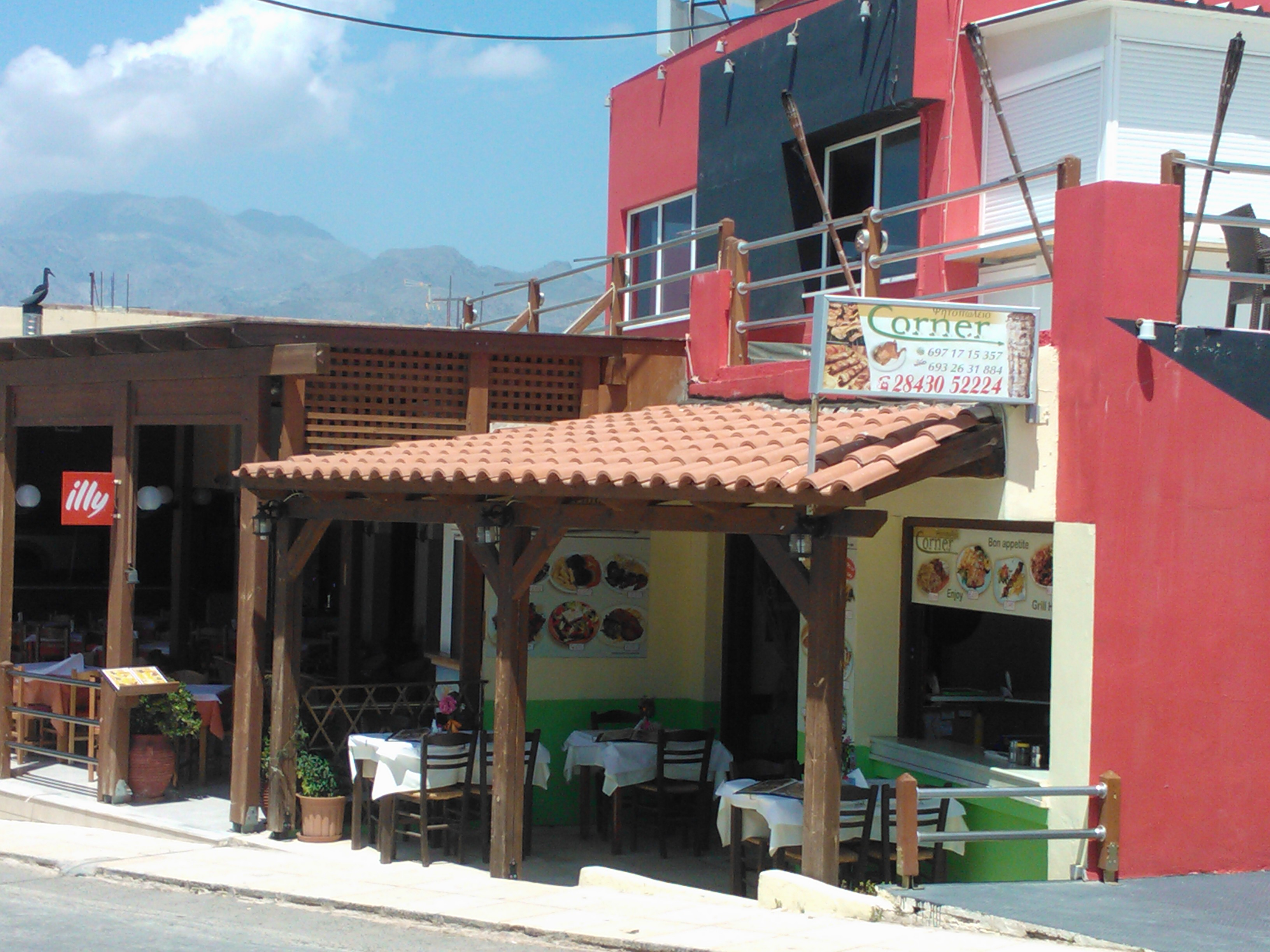 Аналипсис, Крит, Греция